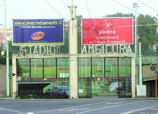 Ingresso attuale dello Stadio Amsicora.